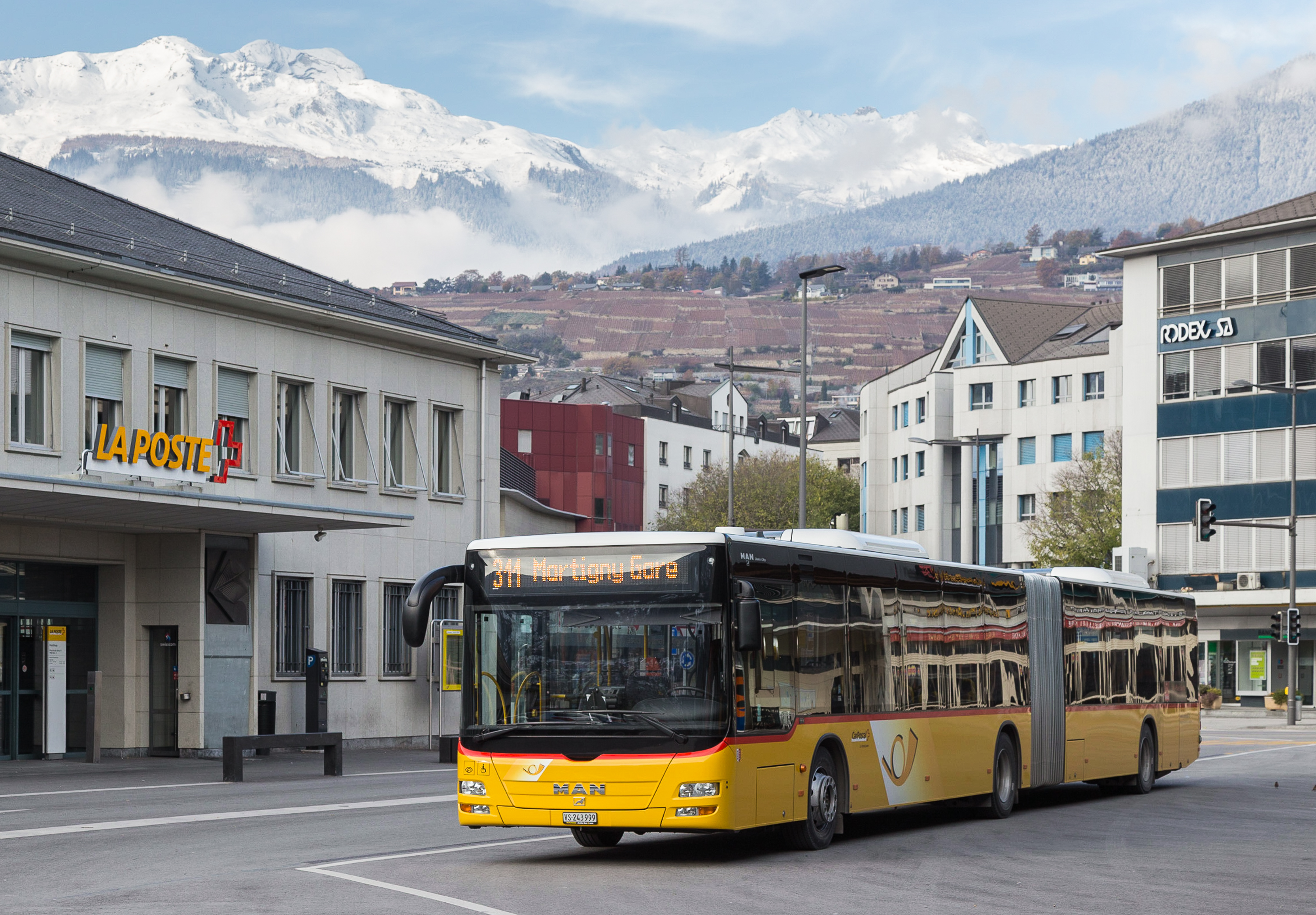 MAN Lion's City als Postauto in Sion VS